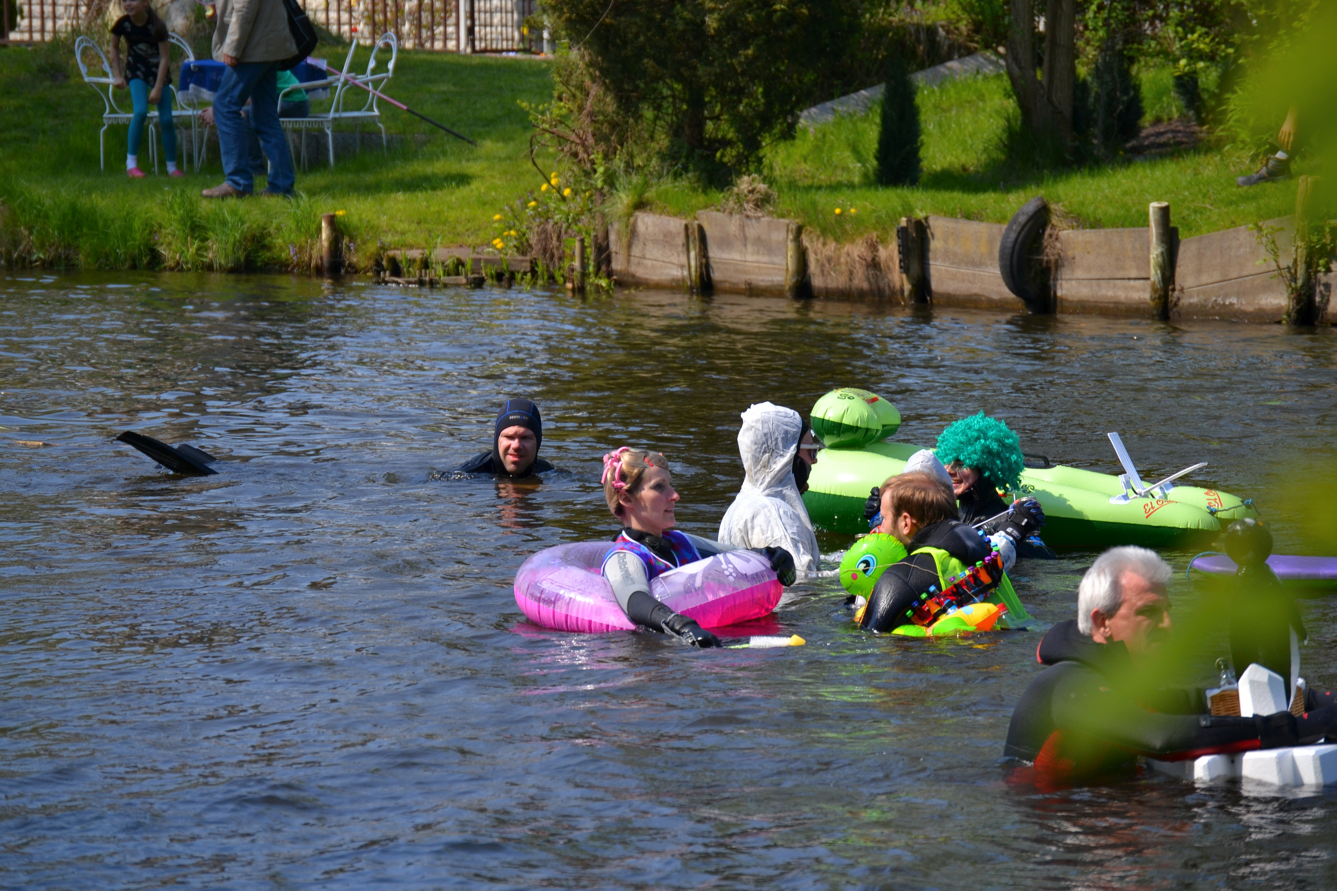 17. Spreetreiben von Neu Zittau nach Erkner am 19. April 2014 kurz hinter dem Start an der Brücke Neu Zittau